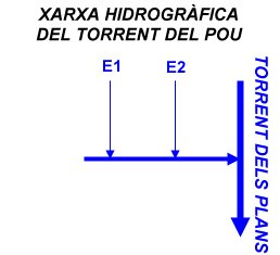 Esquema de la xarxa hidrogràfica del Torrent del Pou, a la Vall de Lord.